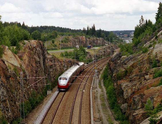 Vestre linje: nytt dobbeltspor syd for Vestby med et type 73B-sett.